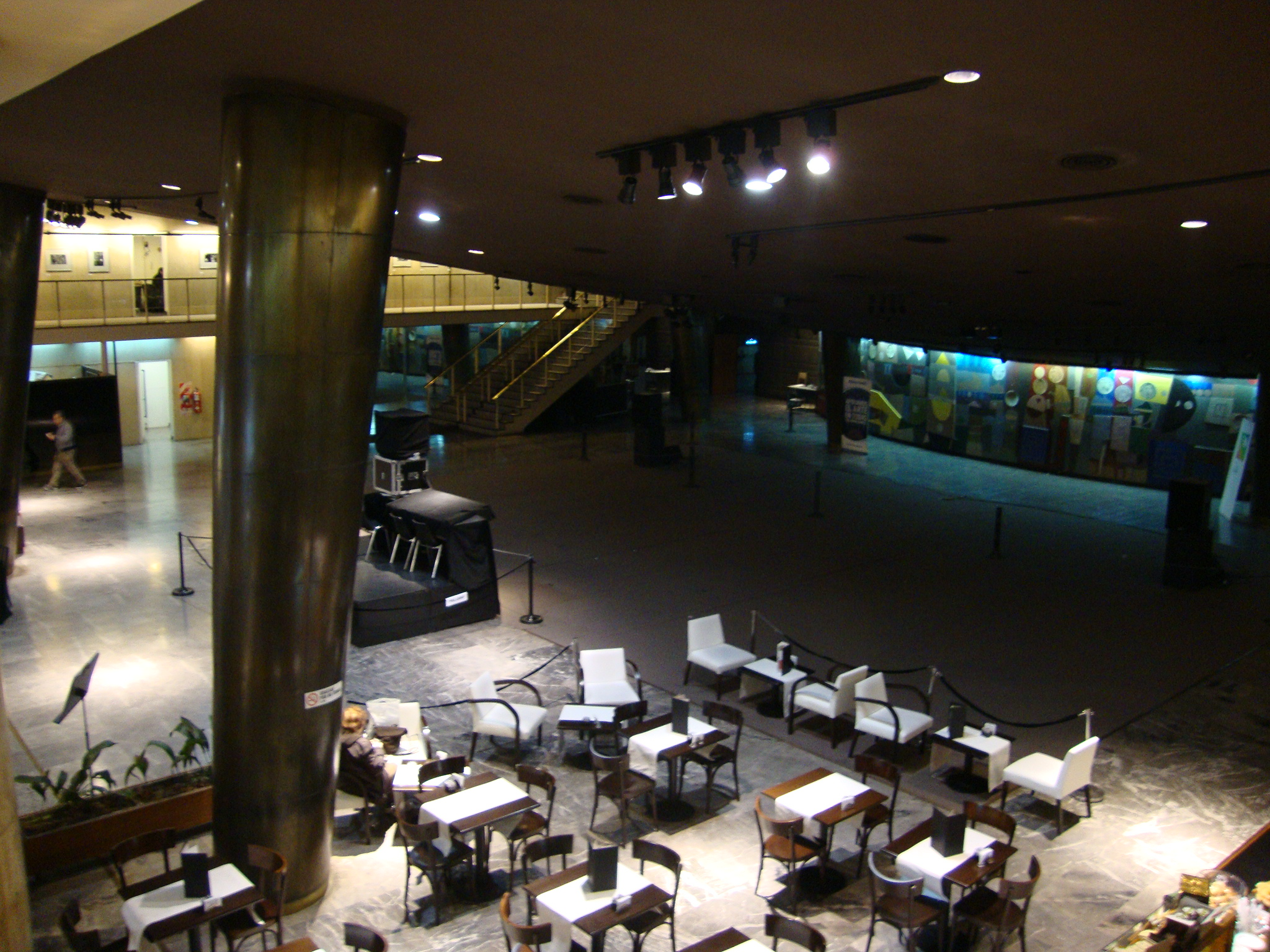 Hall principal y confitería del Teatro General San Martín, visto desde el entrepiso. El techo curvo es el piso de la Sala Martín Coronado, suspendida sobre columnas. Buenos Aires, Argentina.